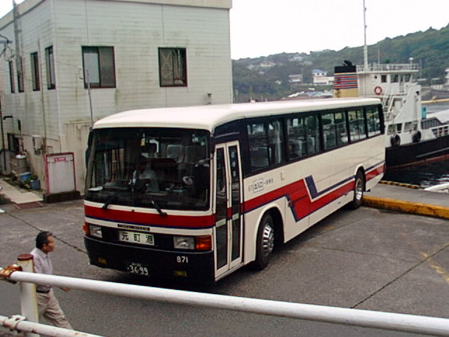 Tokai Kisen (Oshima Bus) at Habu Port.